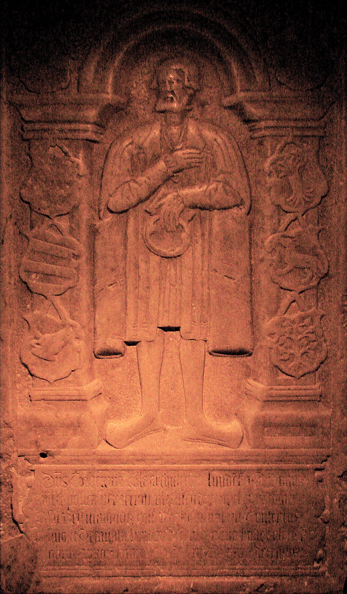 Torbern Bille, erkebiskop i Lund 1532-36, gravsten i Lund Domkirkes krypt, opstillet i krypten efter 1912